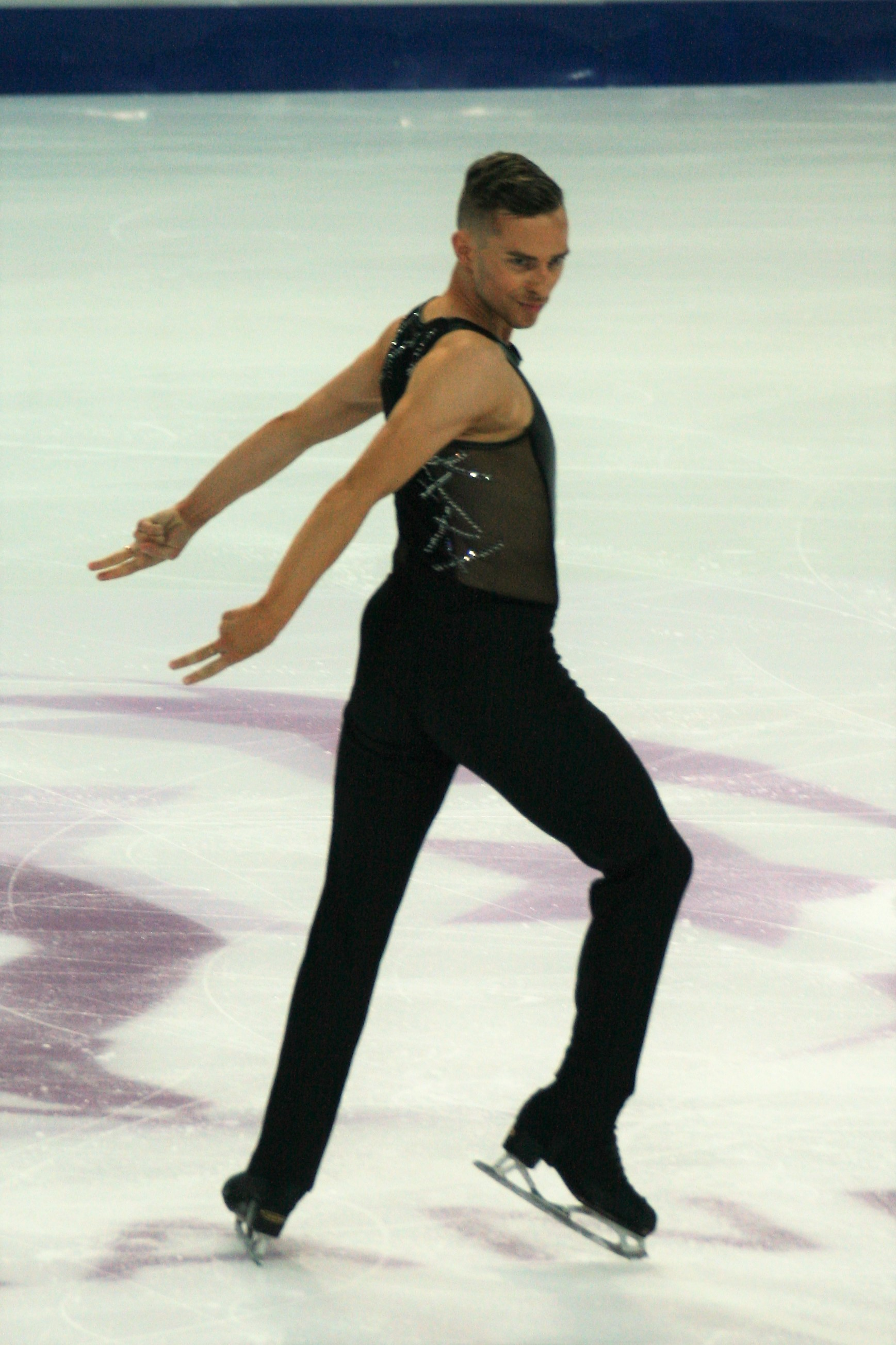 Адам Риппон (США) на финале Гран-при по фигурному катанию 2016-2017